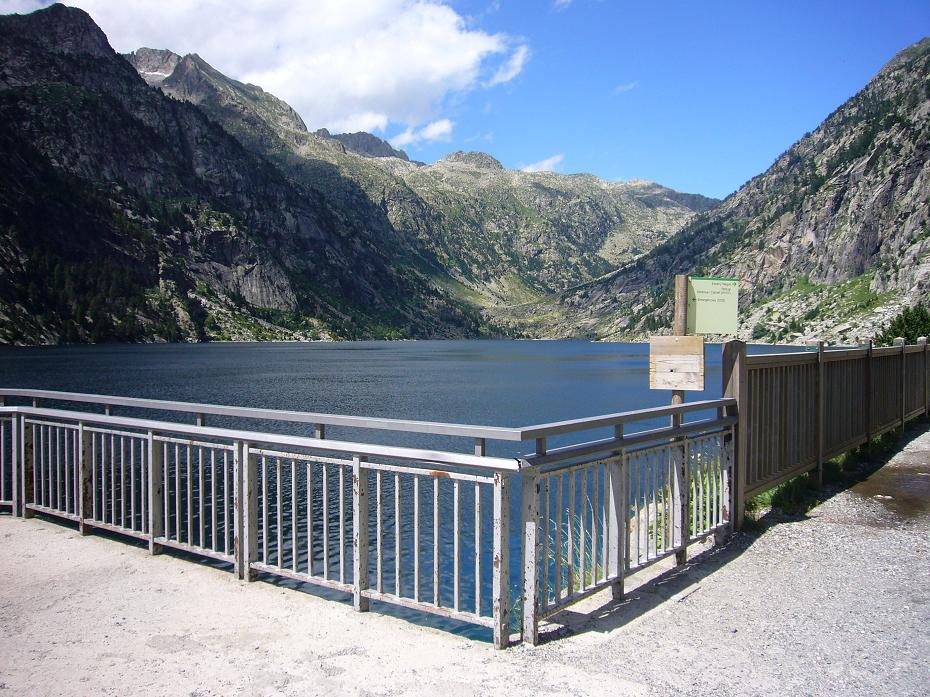 Embassament de Cavallers; la Vall de Boí, Alta Ribagorça, Catalunya